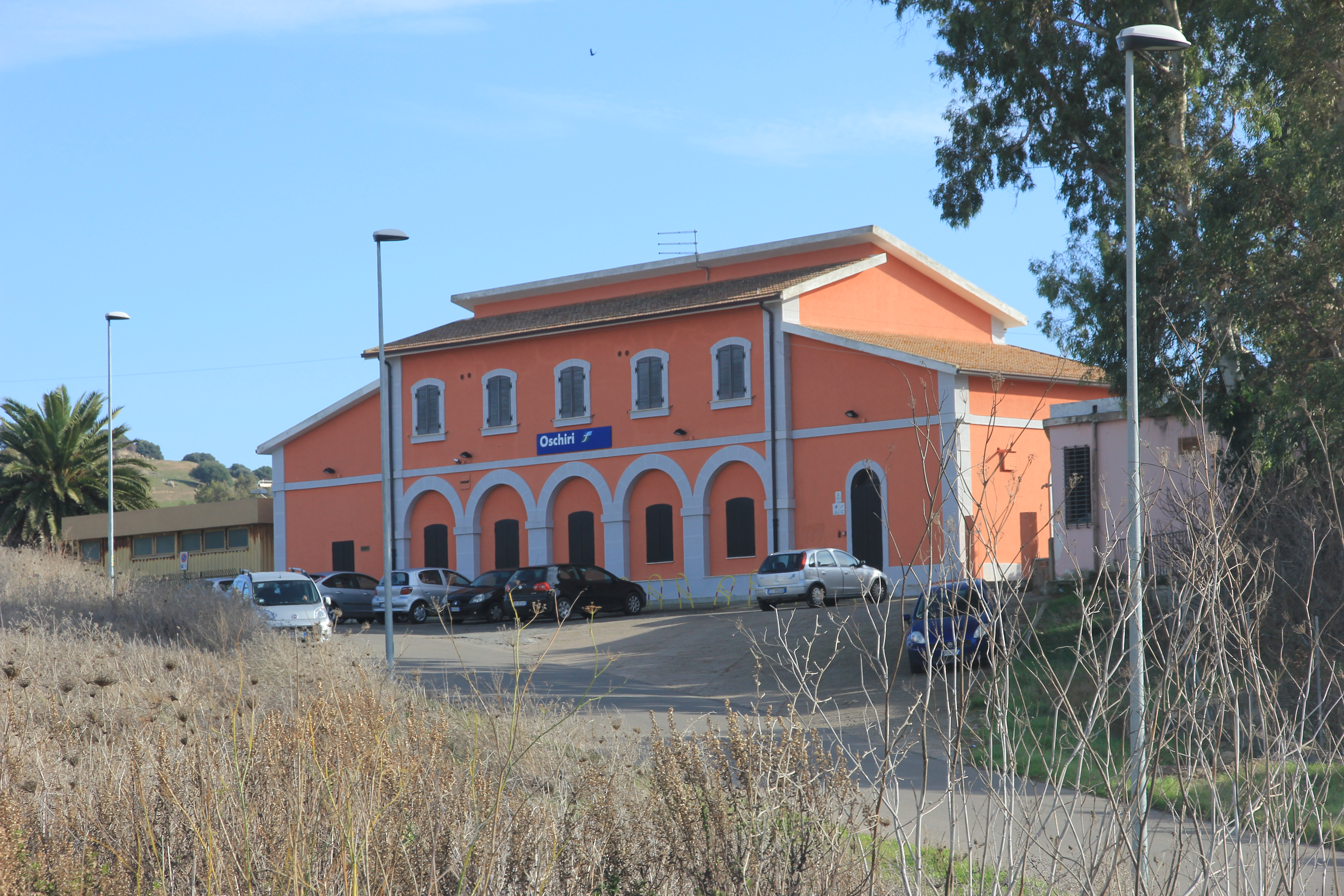 Oschiri - Stazione ferroviaria